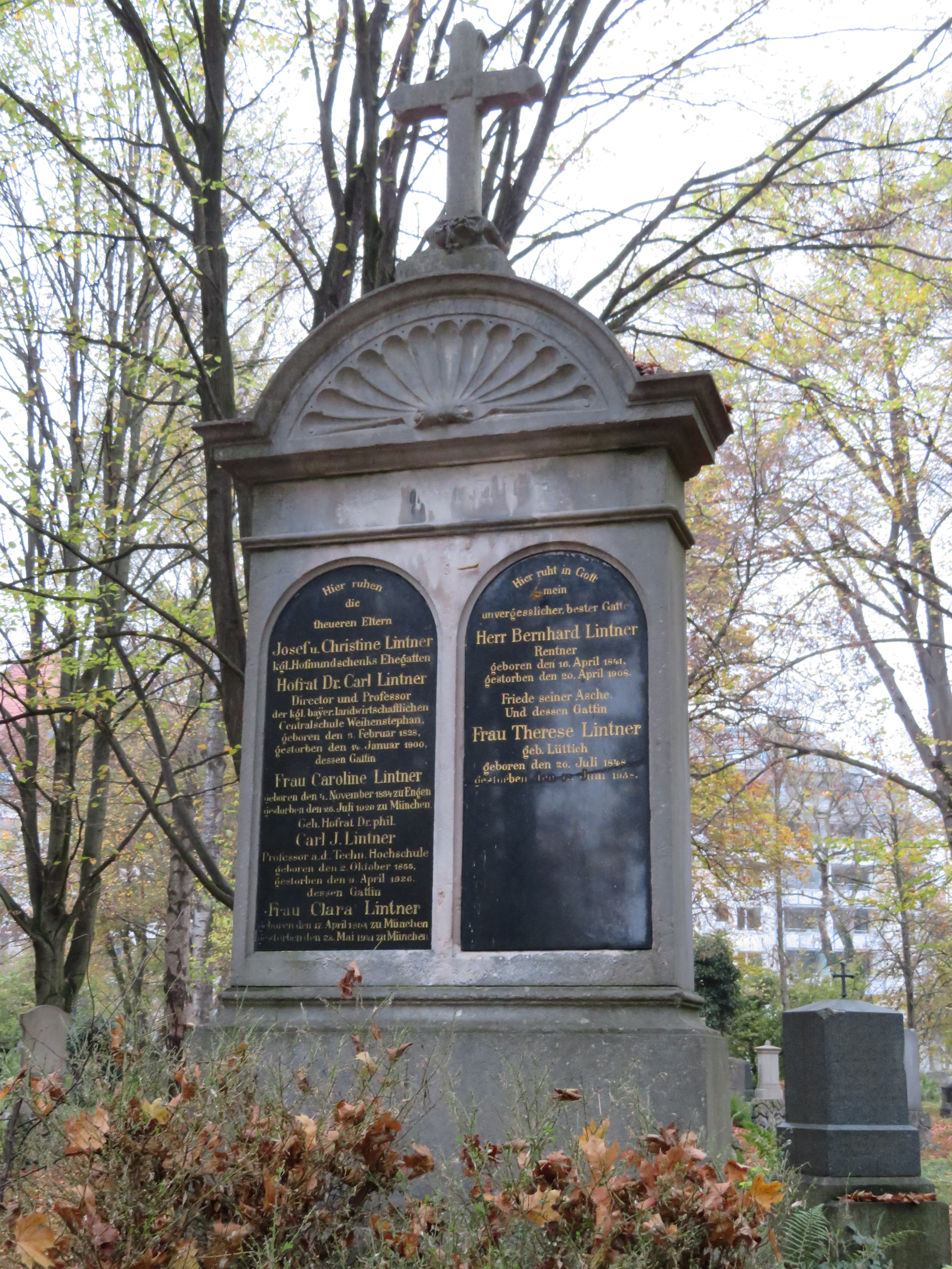 auf dem Alten Südlichen Friedhof in München